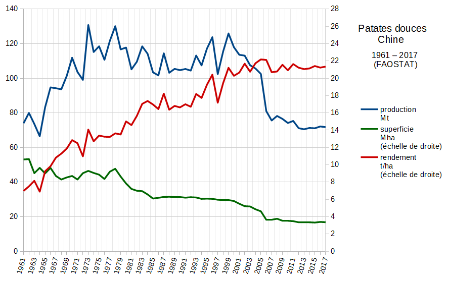 Évolution de la production de patates douces en Chine de 1961 à 2017 (données FAOSTAT)